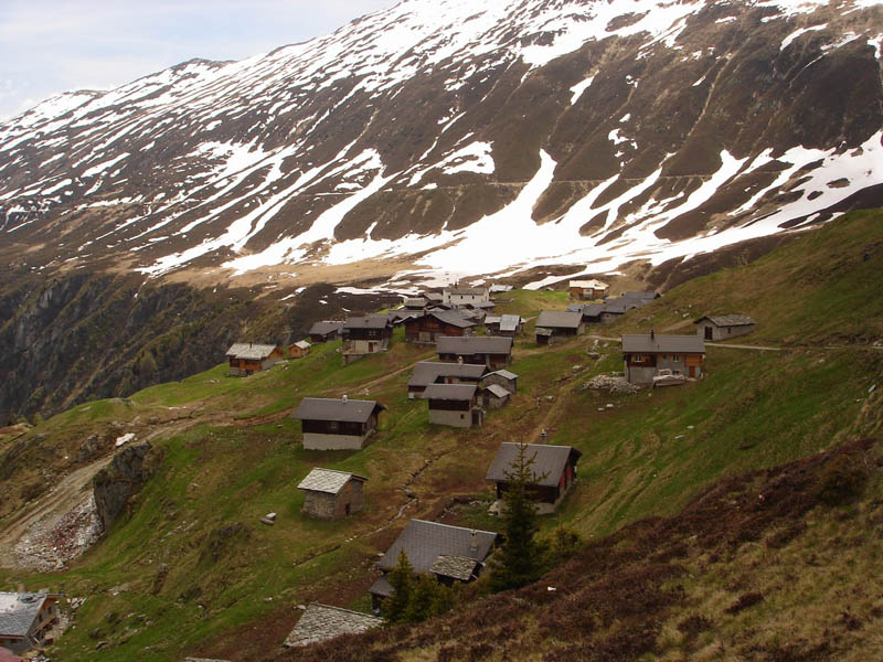 Alpe Bäll, Belalp